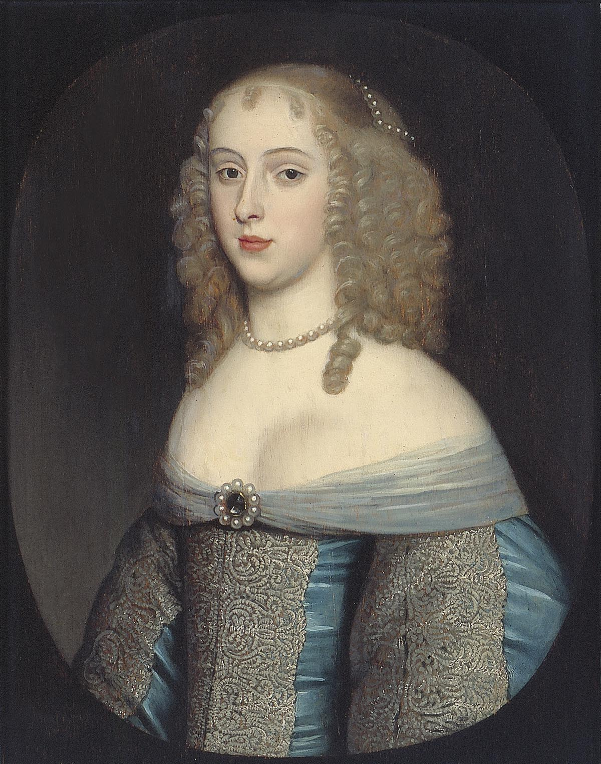 Elisabeth van Nassau-Beverweerd (ca.1635-1718), echtgenote van Henry Bennet (1618-1685), eerste graaf van Arlington